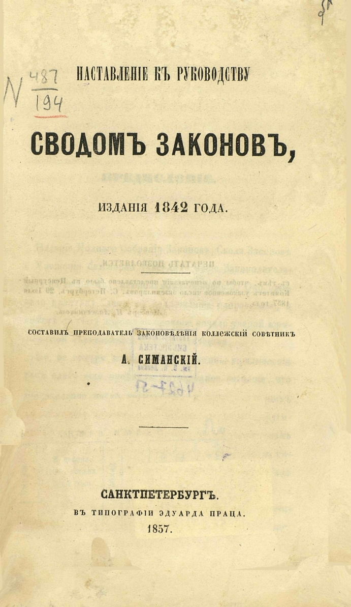 Наставление к руководству Сводом законов издания 1842 года